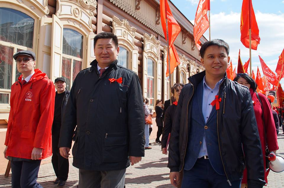 Вячеслав Михайлович на первомайском шествии 2016 года. (посередине)